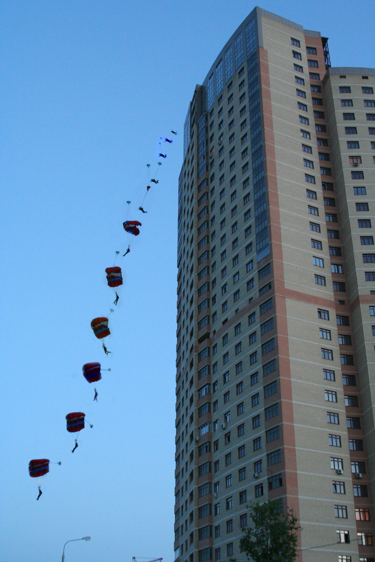 Мой прыжок со здания.